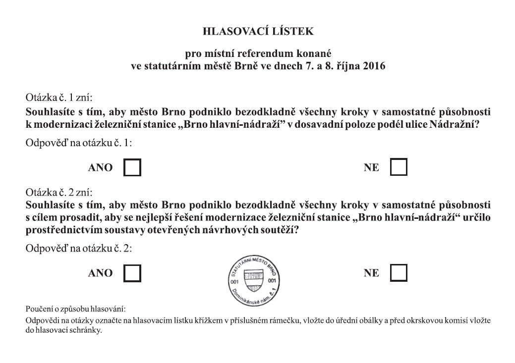 Podoba hlasovacího lístku pro místní referendum o poloze hlavního nádraží v Brně 7. a 8. října 2016